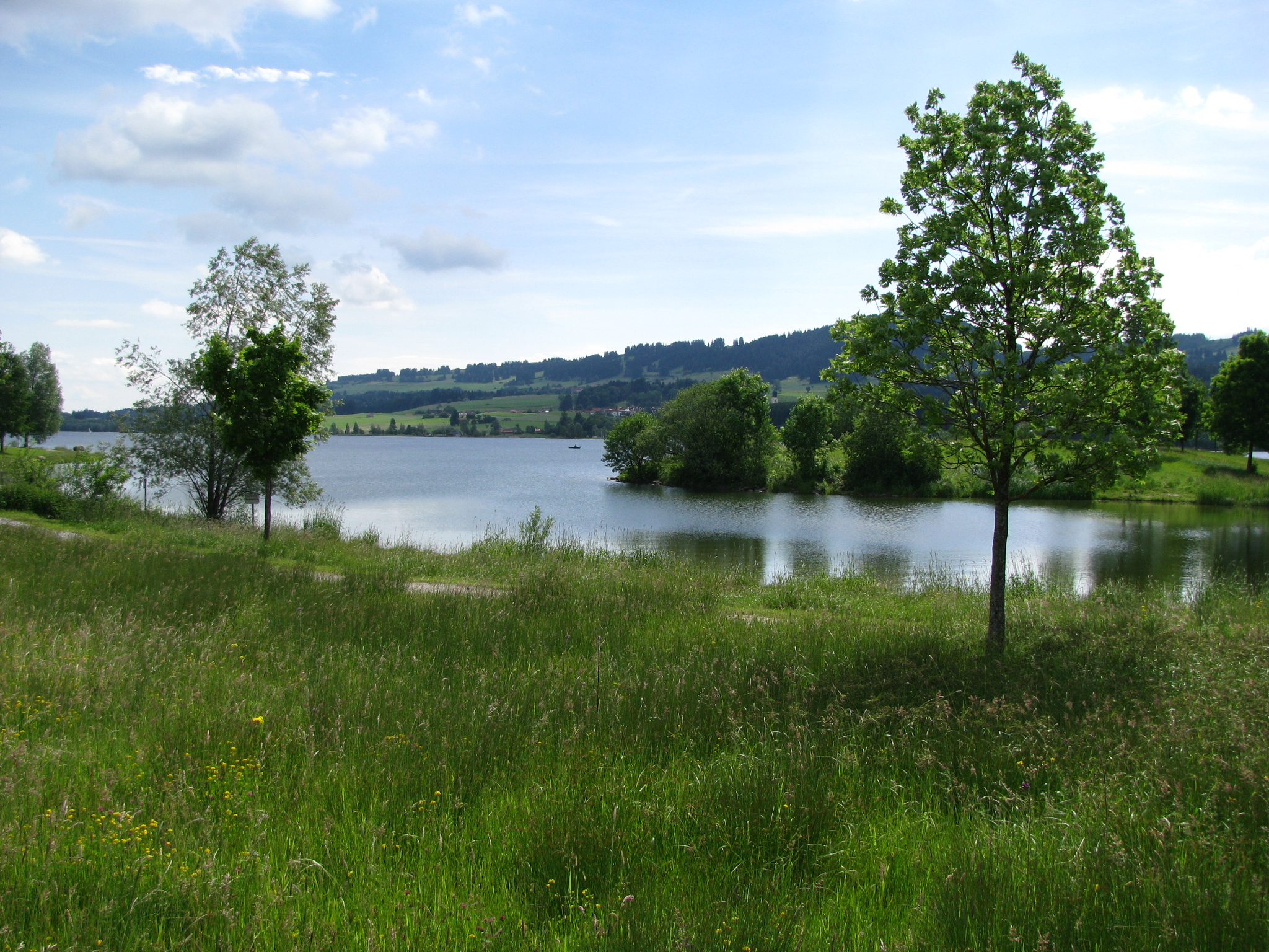 Teilansicht des Rottachsees, von Moosbach aus gesehen, im Hintergrund das Burgkranzegger Horn (durch Baum etwas verdeckt)